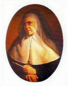 portrait de sainte Emilie de Rodat